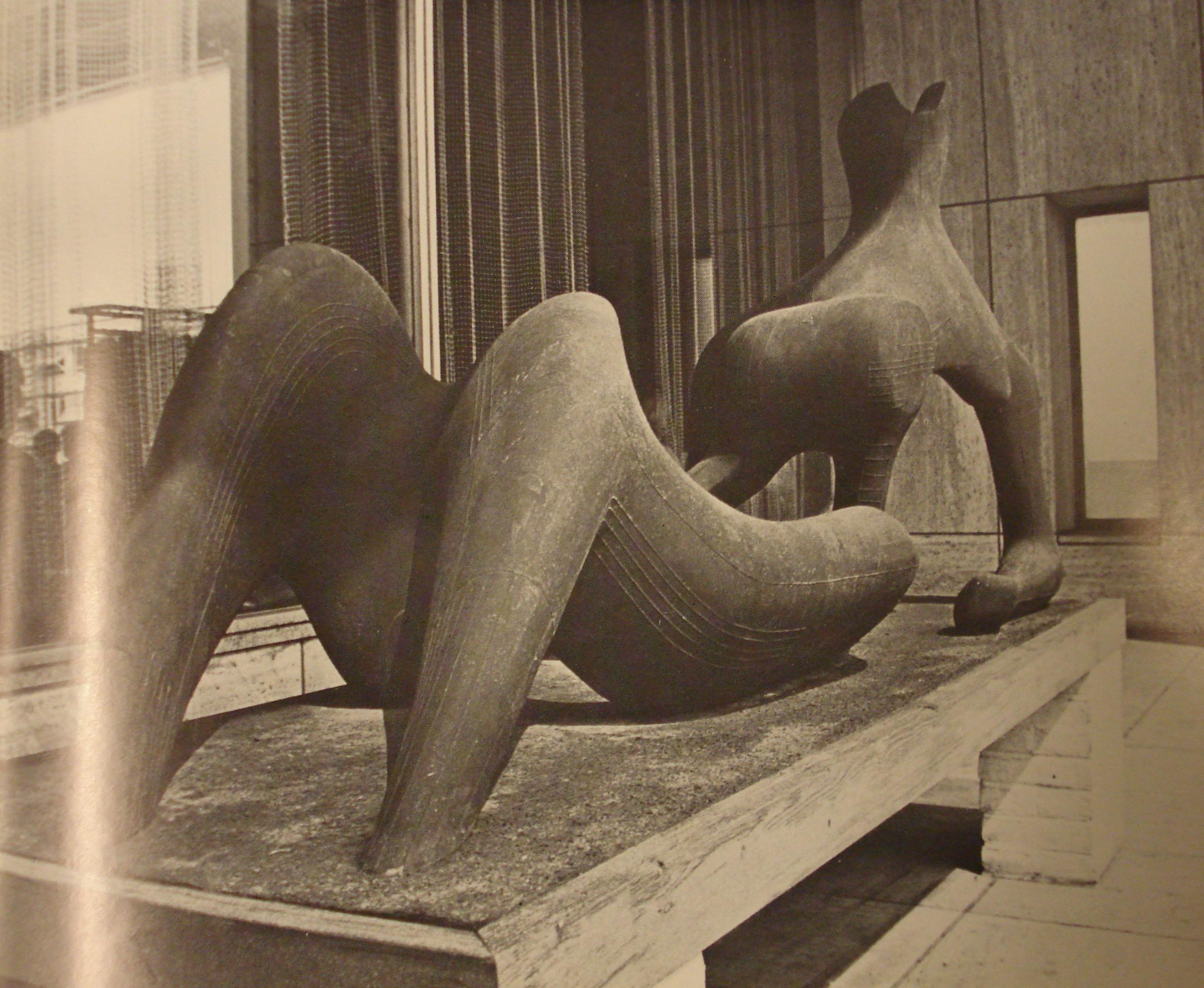 Rotterdam, Coolsingel. Voormalig kunstwerk in De Bijenkorf: "Reclining figure" van Henry Moore. Rotterdam/The Netherlands.